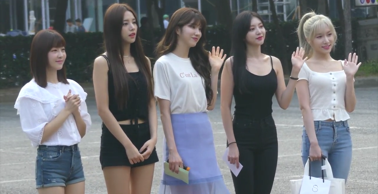 Laboum chegando ao Music Bank, em 27 de julho de 2018